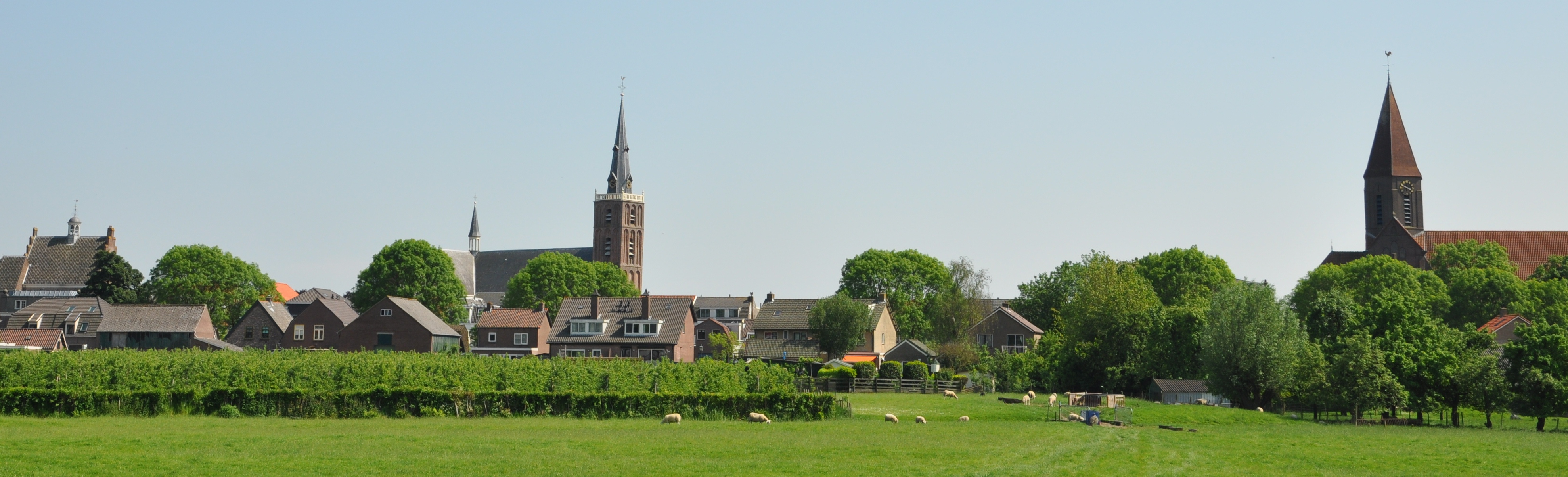 De skyline van Montfoort, gezien vanaf de Doeldijk.